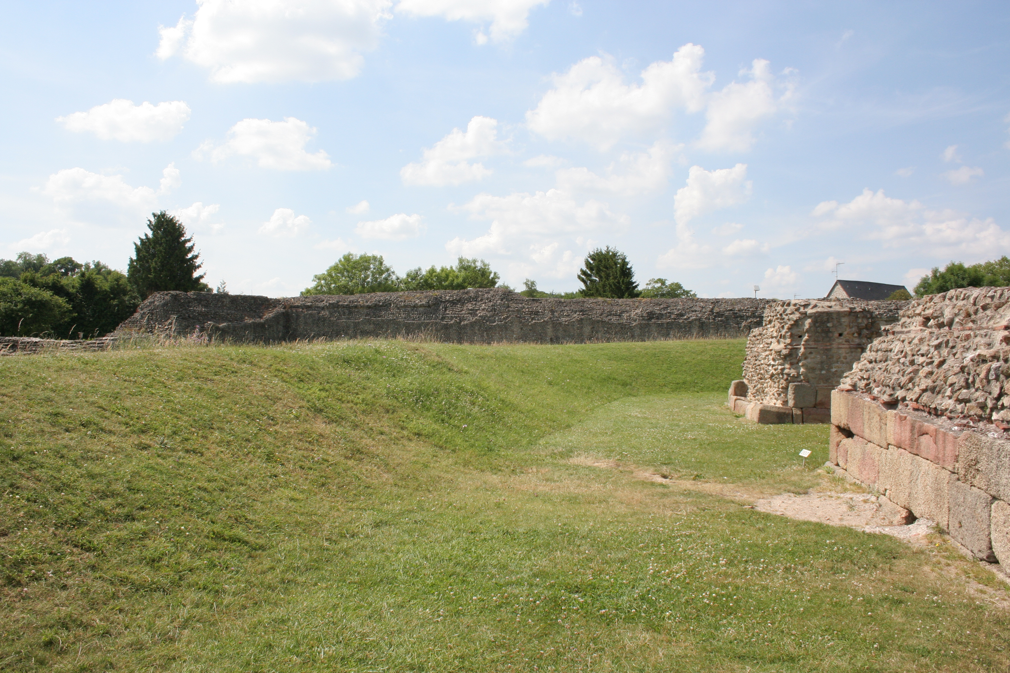 Site archéologique de Jublains, France. Site du castellum.